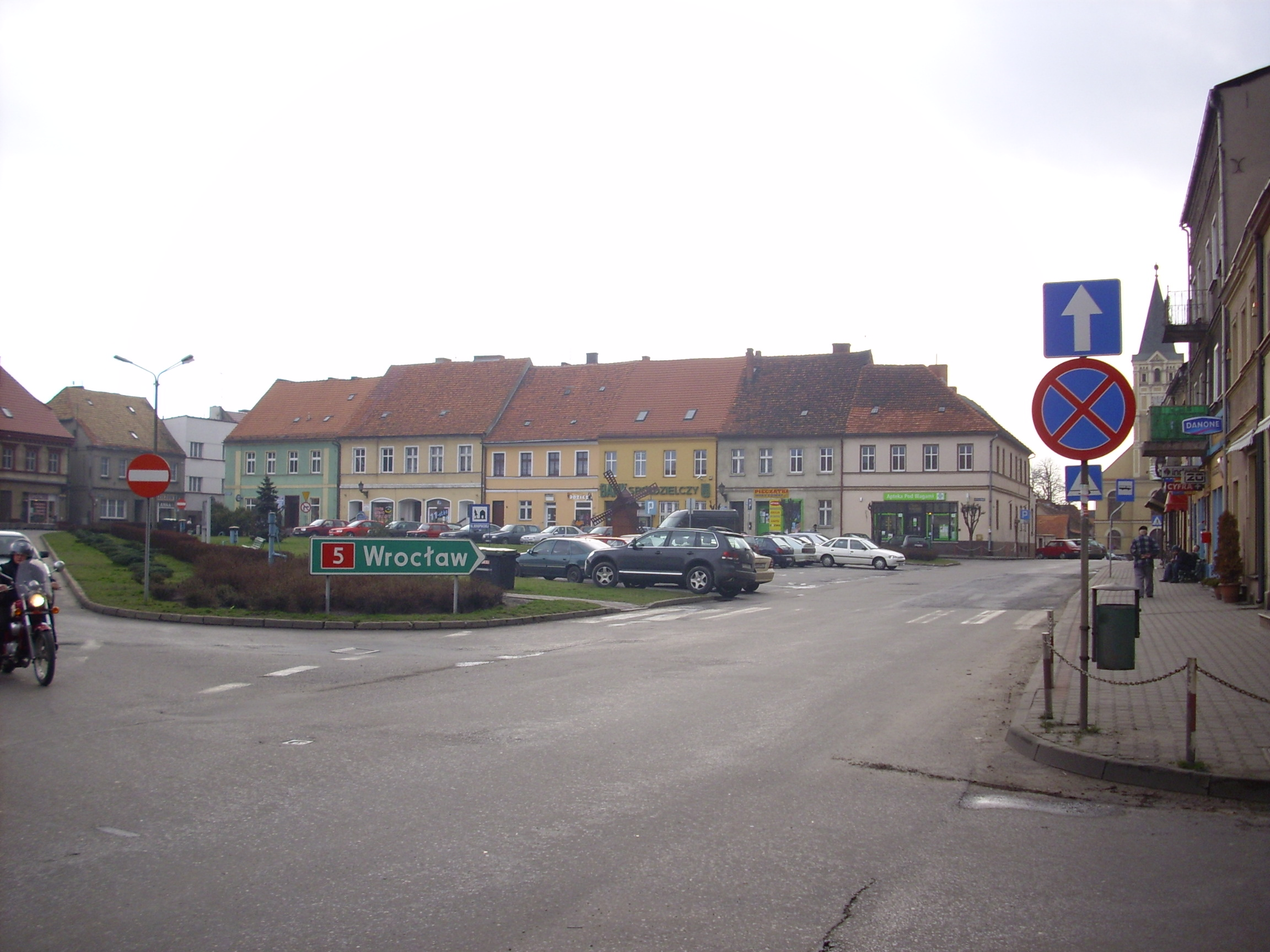 Śmigiel. Rynek.